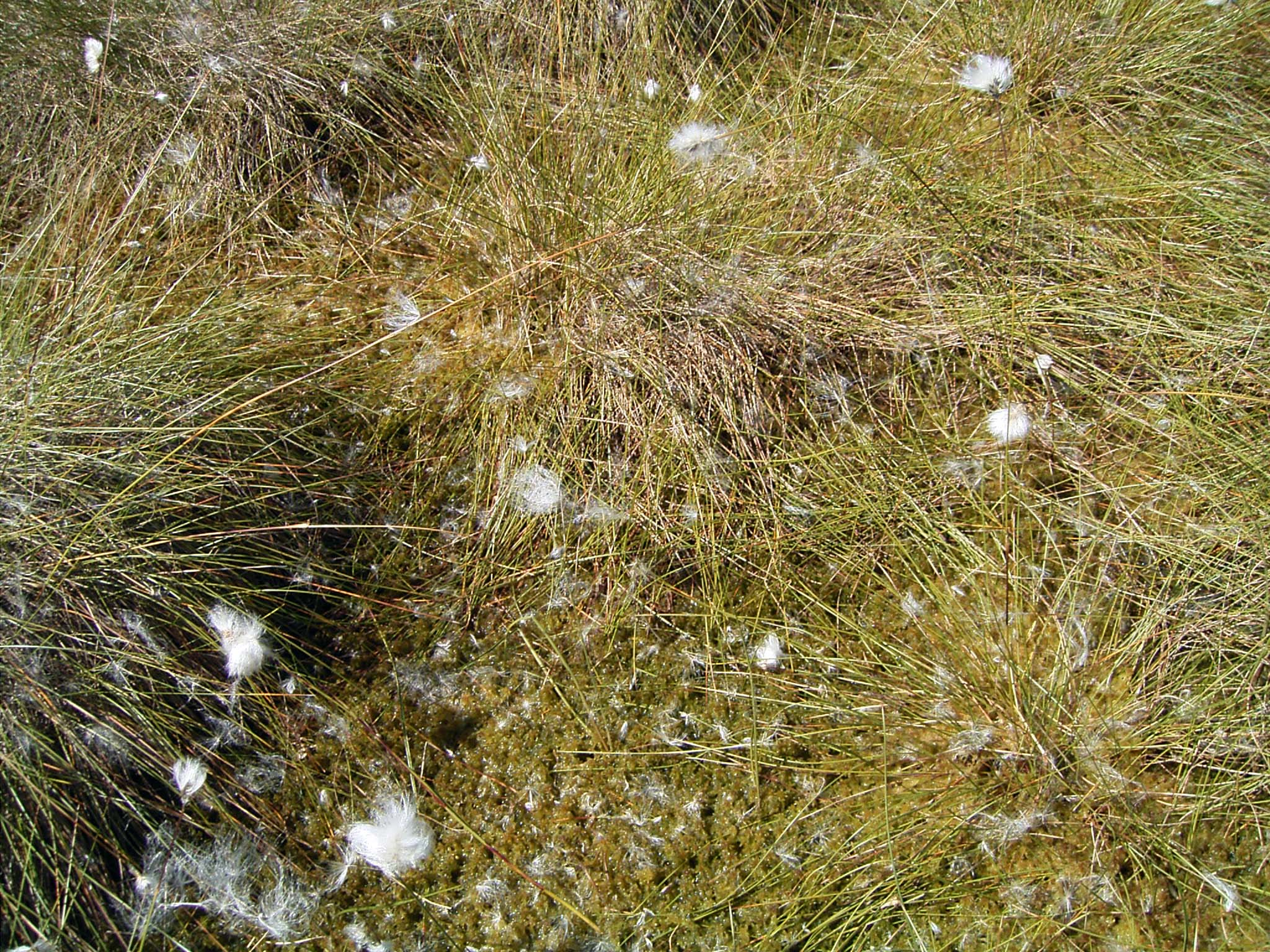 Scheiden-Wollgras (Eriophorum vaginatum) mit zwischen den Wollgrasbulten wachsenen Torfmoosen (Sphagnum cuspidatum), NSG Leegmoor im Emsland